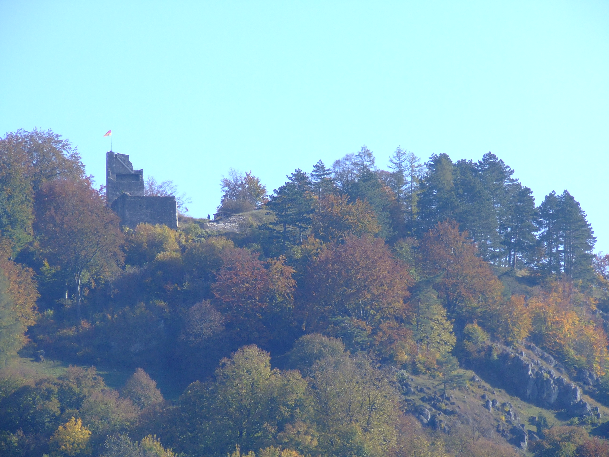 Burgruine Velburg in der Oberpfalz von Westen